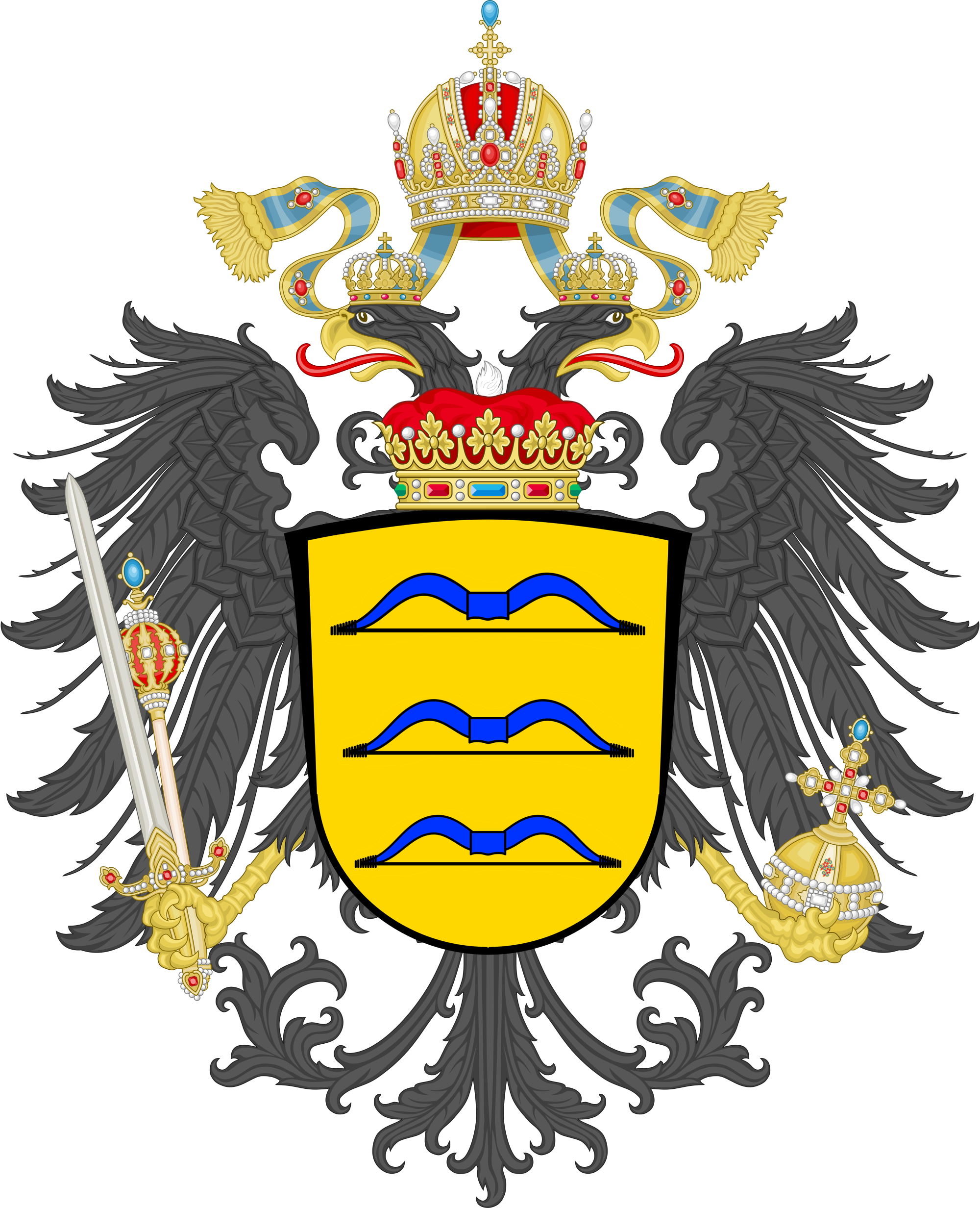 Erlaucht Arco Zinneberg Wappen